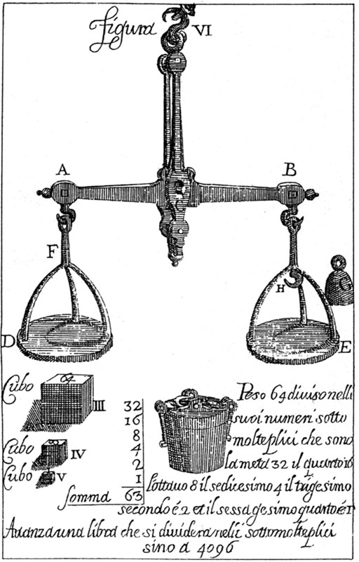 Misura Universale - powiązanie jednostek miar w uniwersalnym systemie Boratiniego